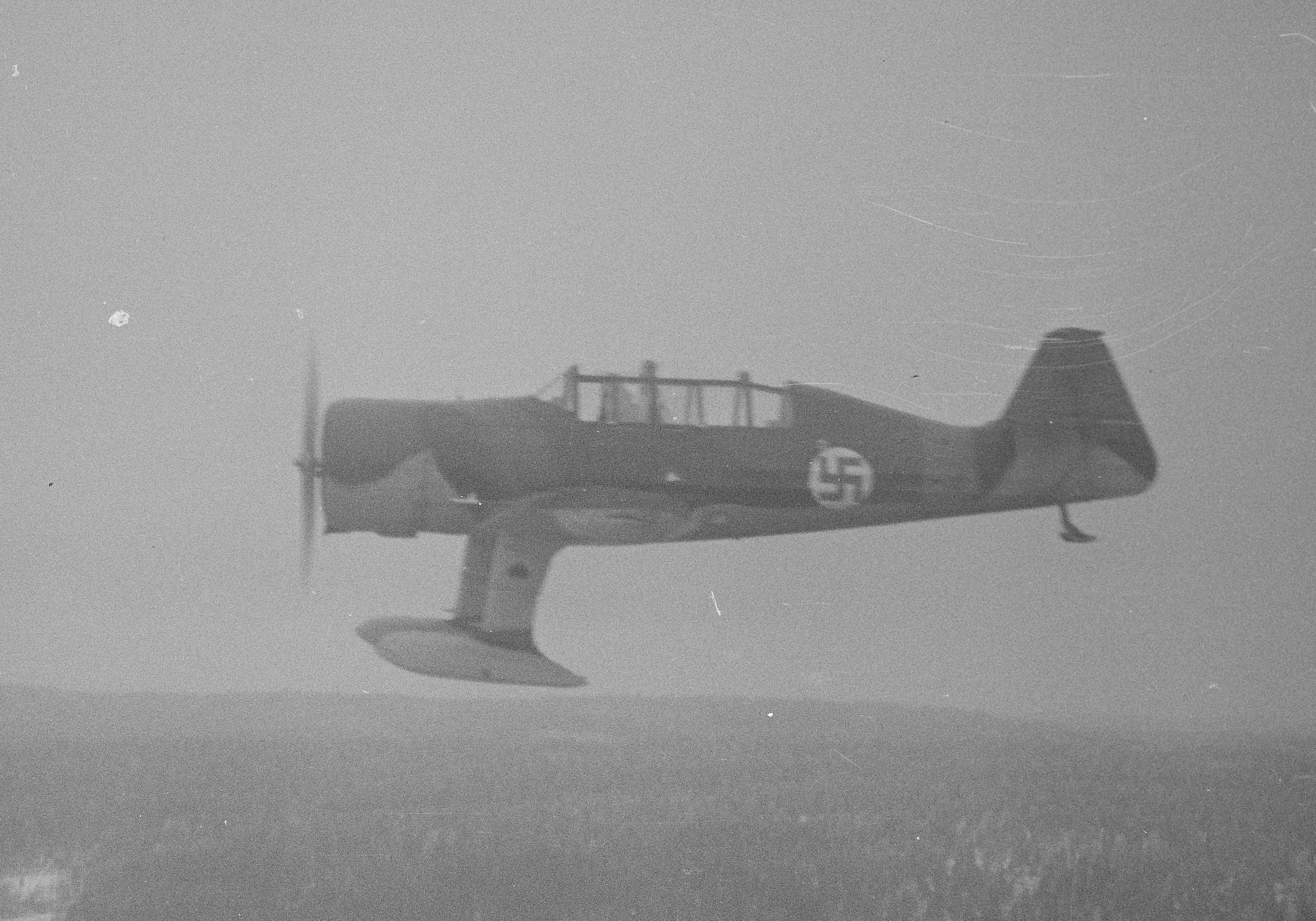 Suomalainen kaksipaikkainen harjoitushävittäjä ””Pyry”” valokuvattuna toisesta koneesta. (SA-kuva 68645). Kuva on leikattu versio tiedostosta VL Pyry (SA-kuva 68645).